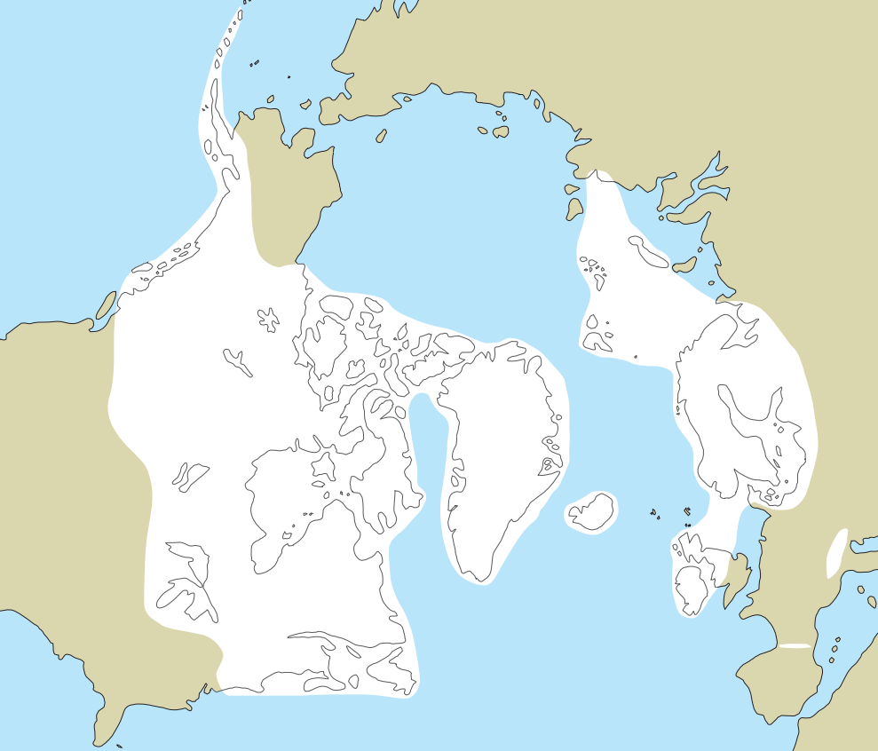 Isens udbredelse for 20.000 år siden, under sidste istids maksimum (Weichsel)